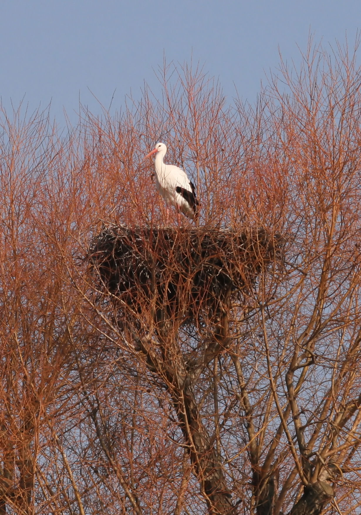 Storchennest mit Weißstorch (Ciconia ciconia) im Karlsruher Zoo, Deutschland